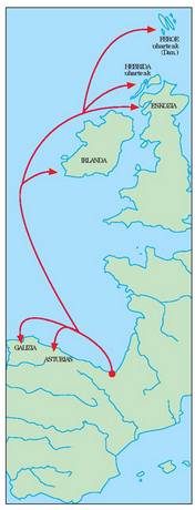 Euskal arrantzaleen balea arrantza tokiak Erdi Aroaren amaiera aldera.